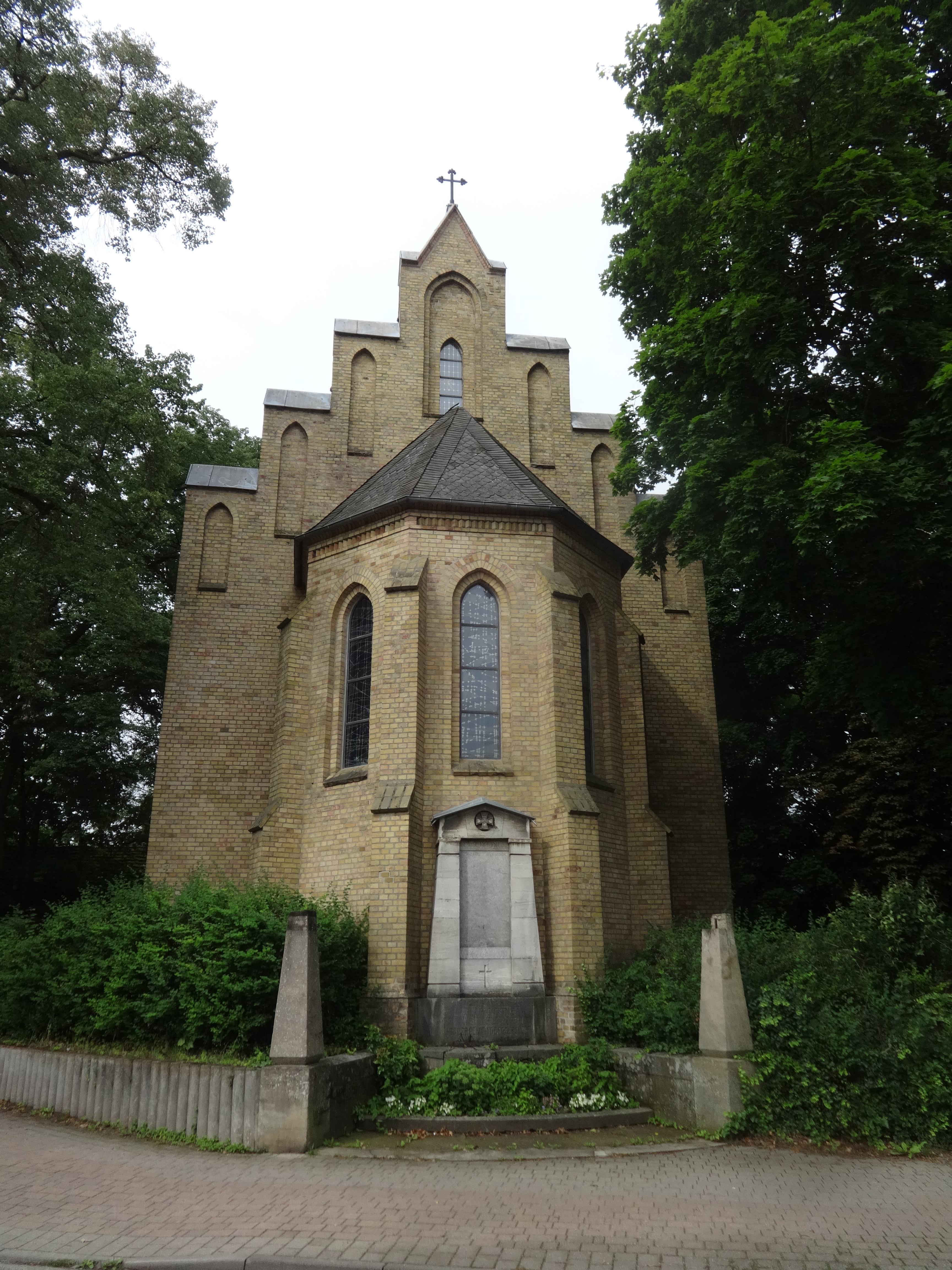 Die Dorfkirche in Eggersdorf ist ein Sichtziegelbau, der im Jahr 1870 nach einem Entwurf des königlichen Bauinspektors Bürckner im Stil von Friedrich August Stüler errichtet wurde. Das Bauwerk steht in Eggersdorf, ein Ortsteil der Gemeinde Petershagen/Eggersdorf im Landkreis Märkisch-Oderland in Brandenburg.